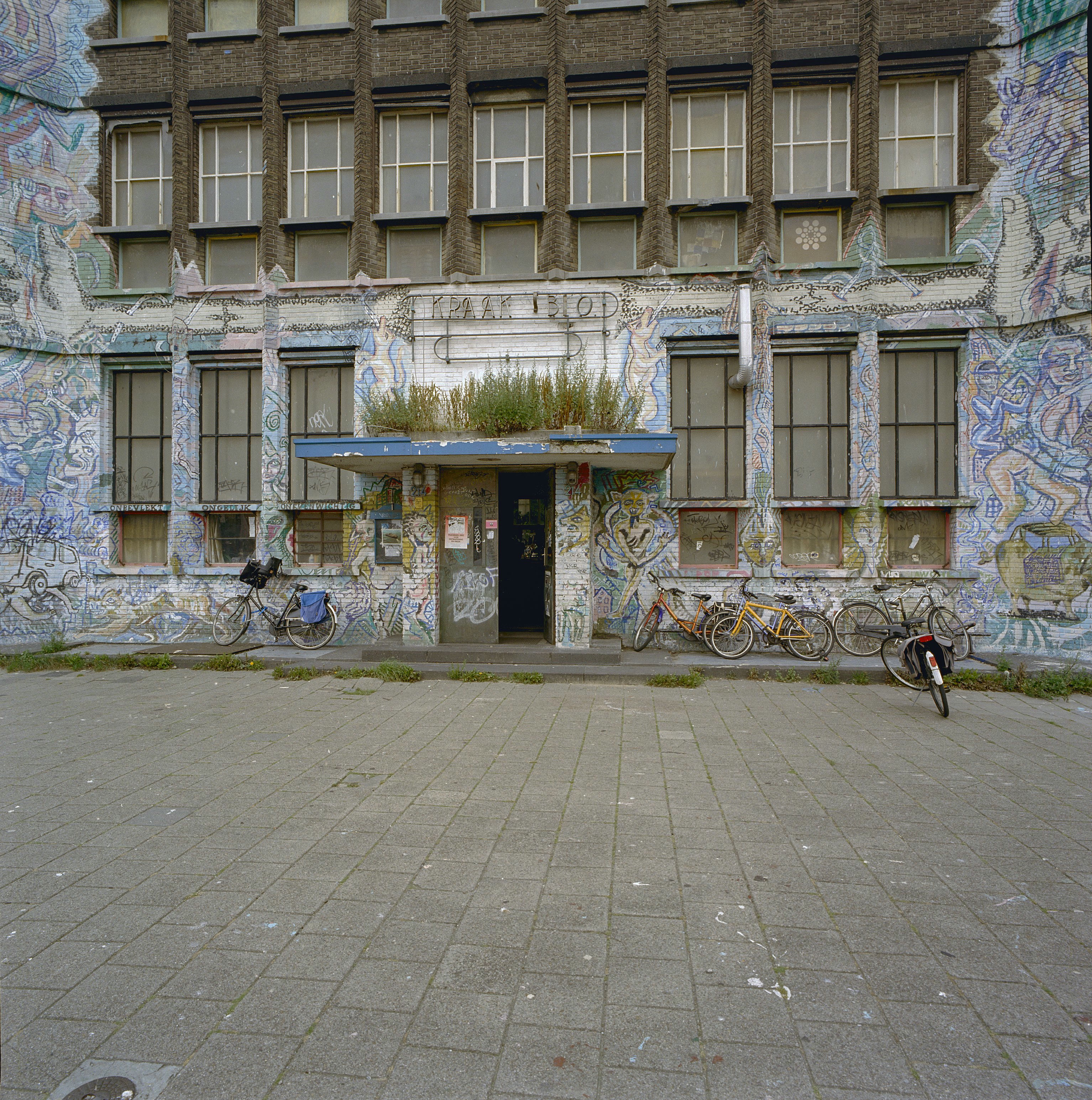 Exterieur, voorgevel met graffiti